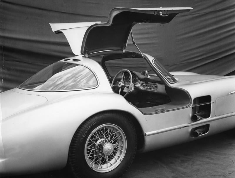 Daimler-Benz A.G., Sindelfingen Typ 300 SL R, Rennsportwagen von Fangio und Moss